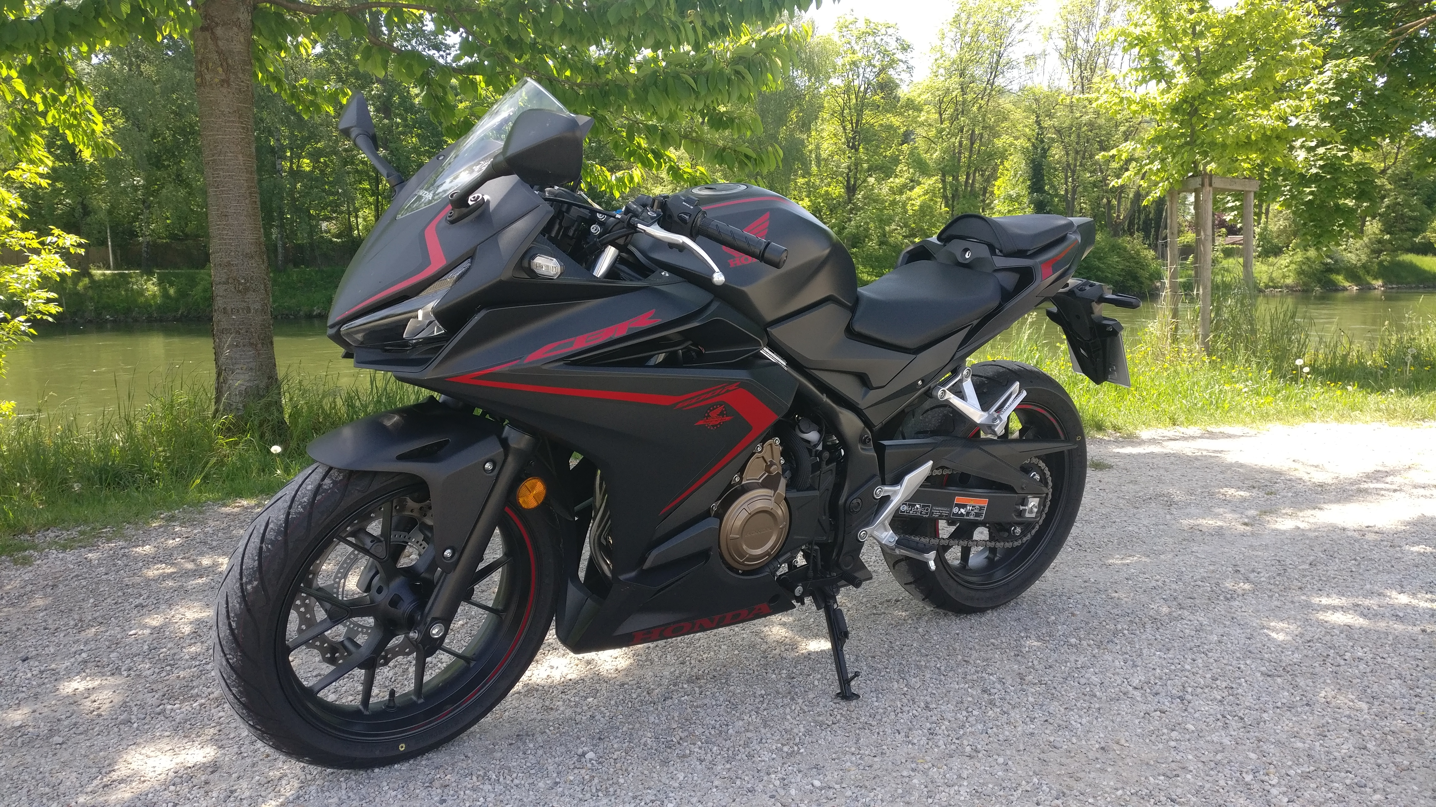 2019 Honda CBR 500R PC62